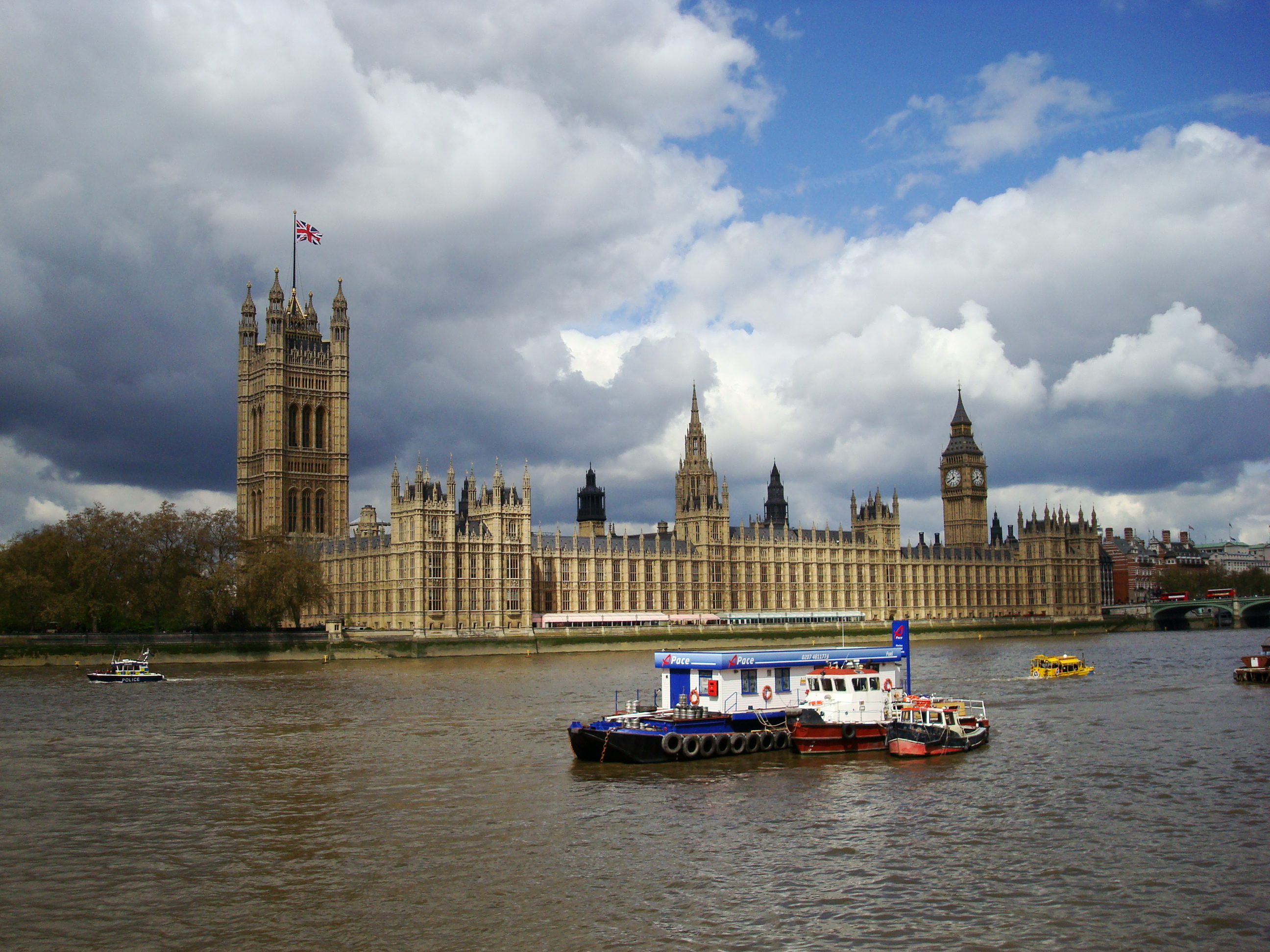 Casas del Parlamento. Palacio de Westminster